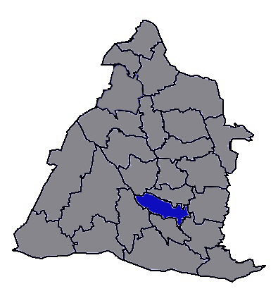 臺灣省彰化縣田尾鄉，本人依照KaurJmeb的底圖繪製。---Nuker 2005年2月6日 12:20 (UTC)。